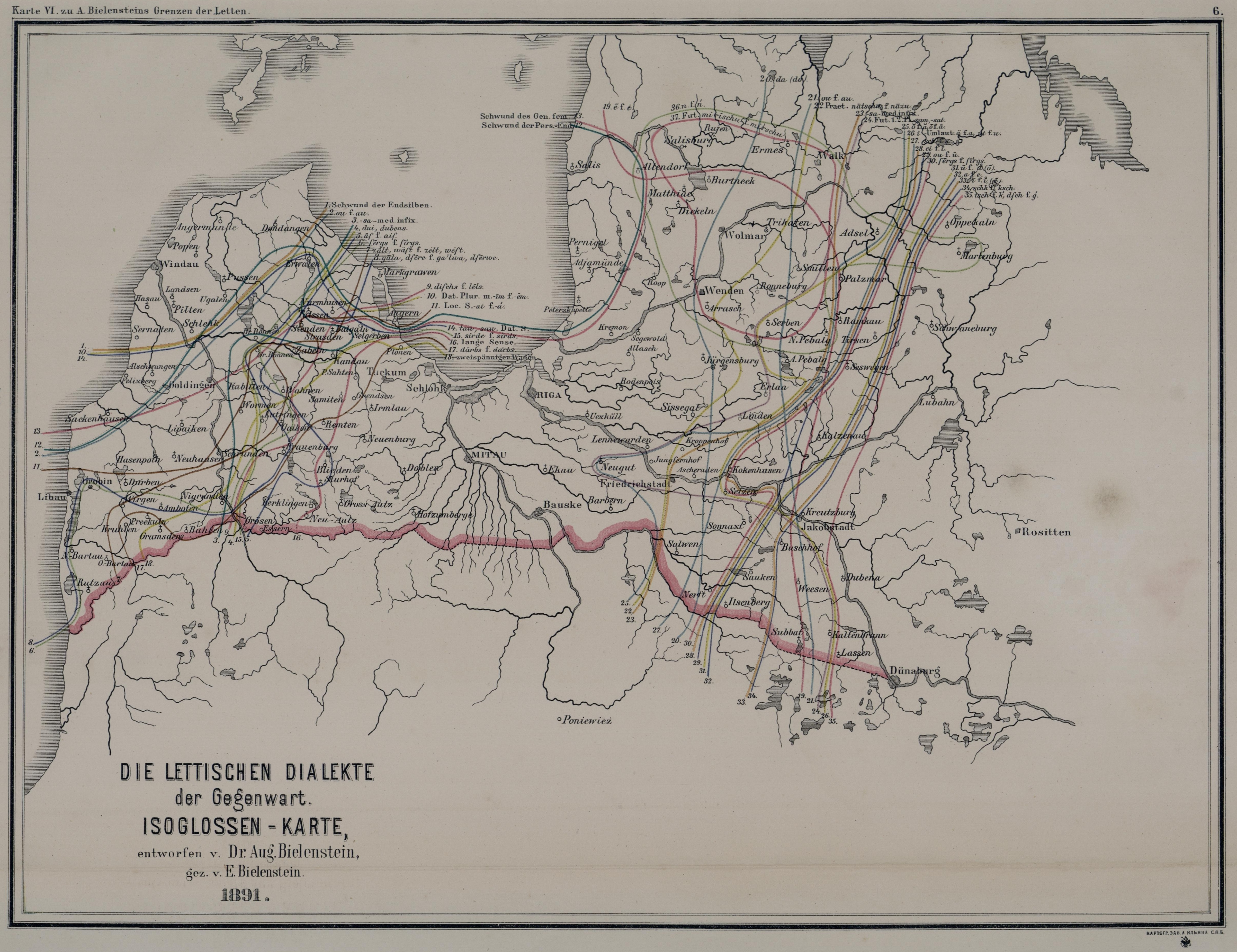 Eine von 12 Dateien, bezeichnet mit "Bielenstein Atlas..." von August Bielenstein. Beschrieben in "Bielenstein Atlas Text 1.jpg" bis "Bielenstein Atlas Text 4.jpg"